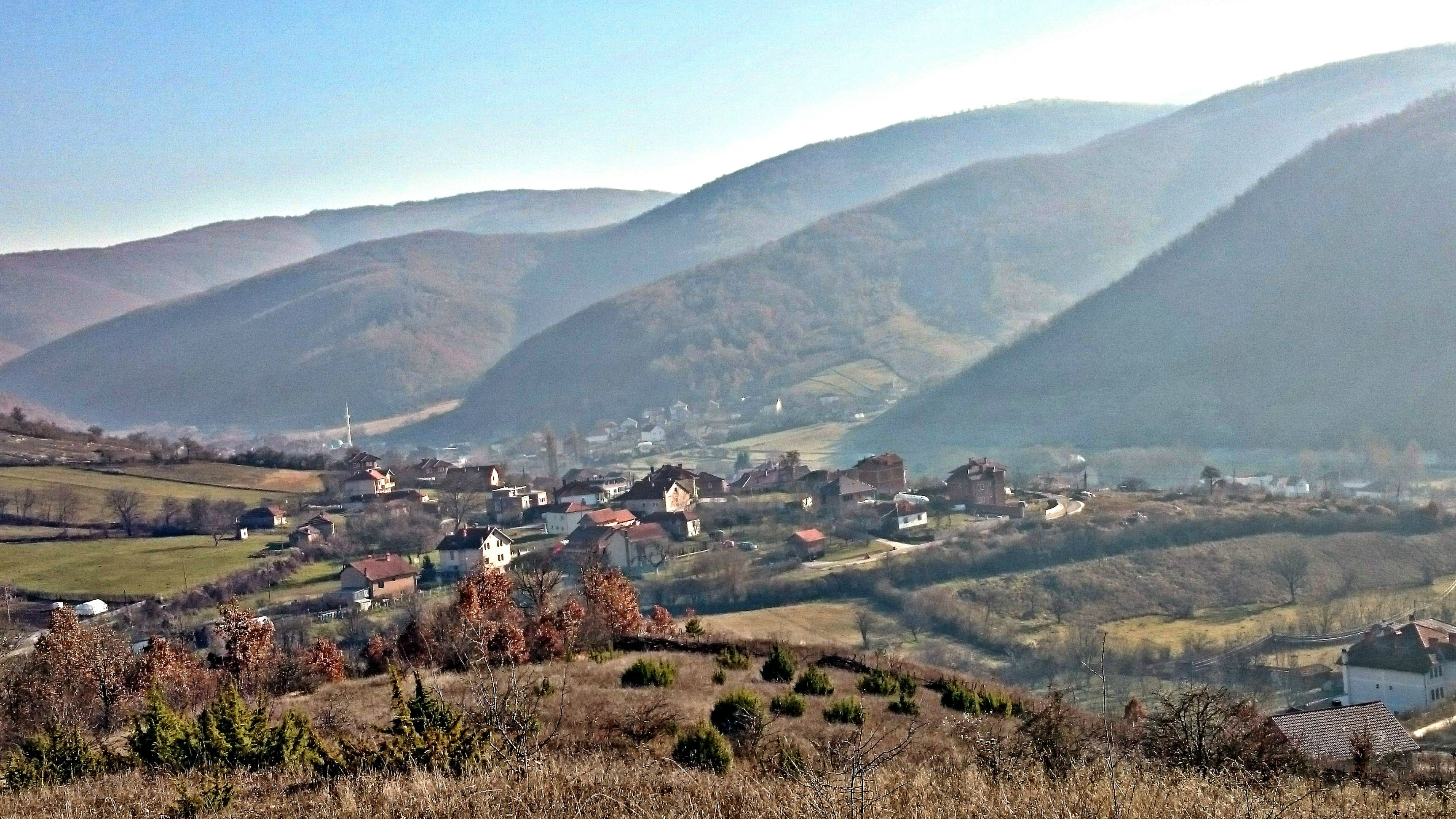 Deitsch: Aussicht auf das Dorf Makovc bei Prishtina, Kosovo